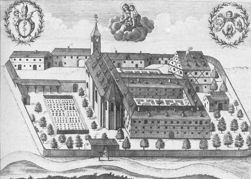 Die Mariensteiner Klosteranlage. Kupferstich von Johann Frank, um 1680